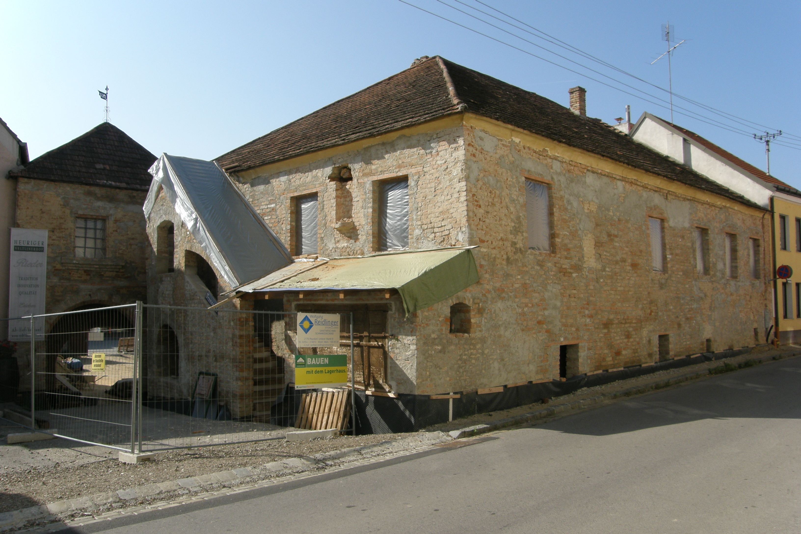 Eisenhuthaus mit Wirtschaftsgebäude (derzeit Renovierung)